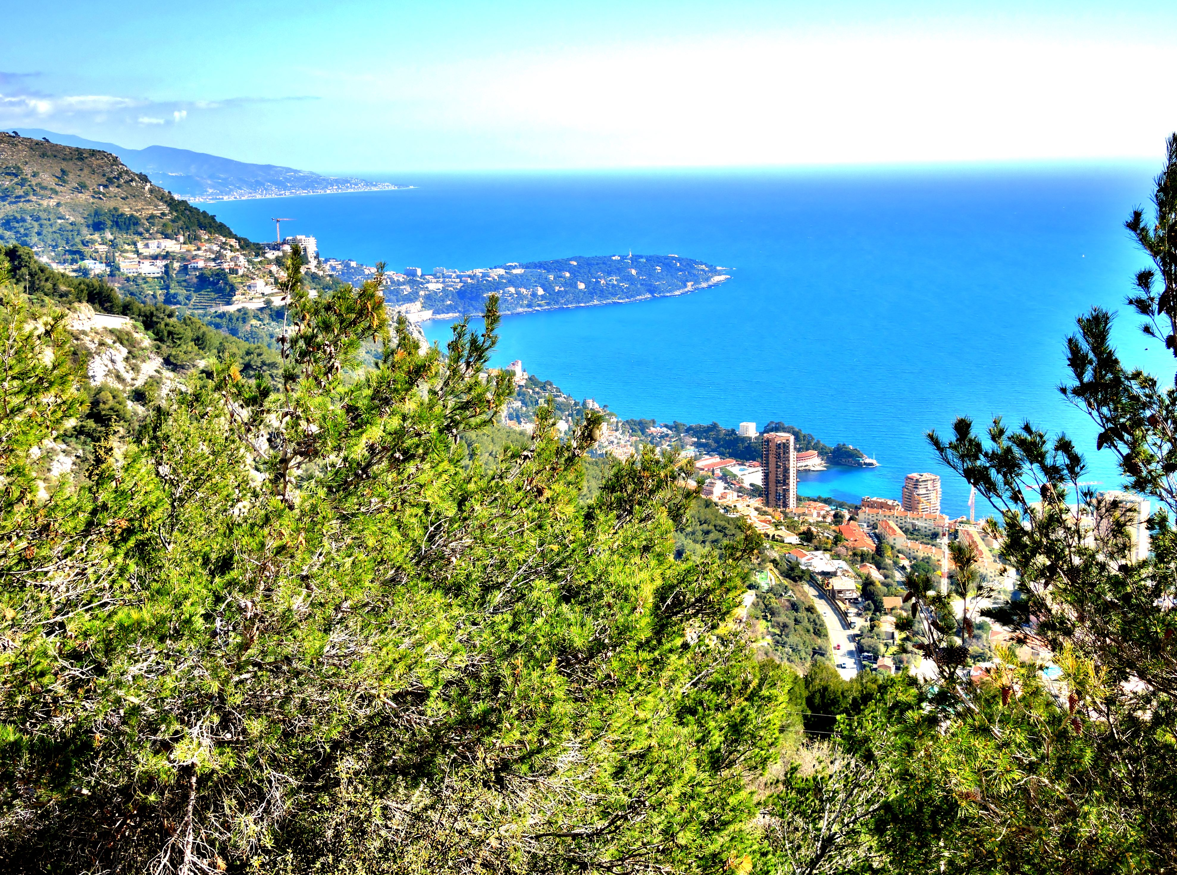 Panorama sur Monaco, depuis l'aire de repos de Beausoleil.